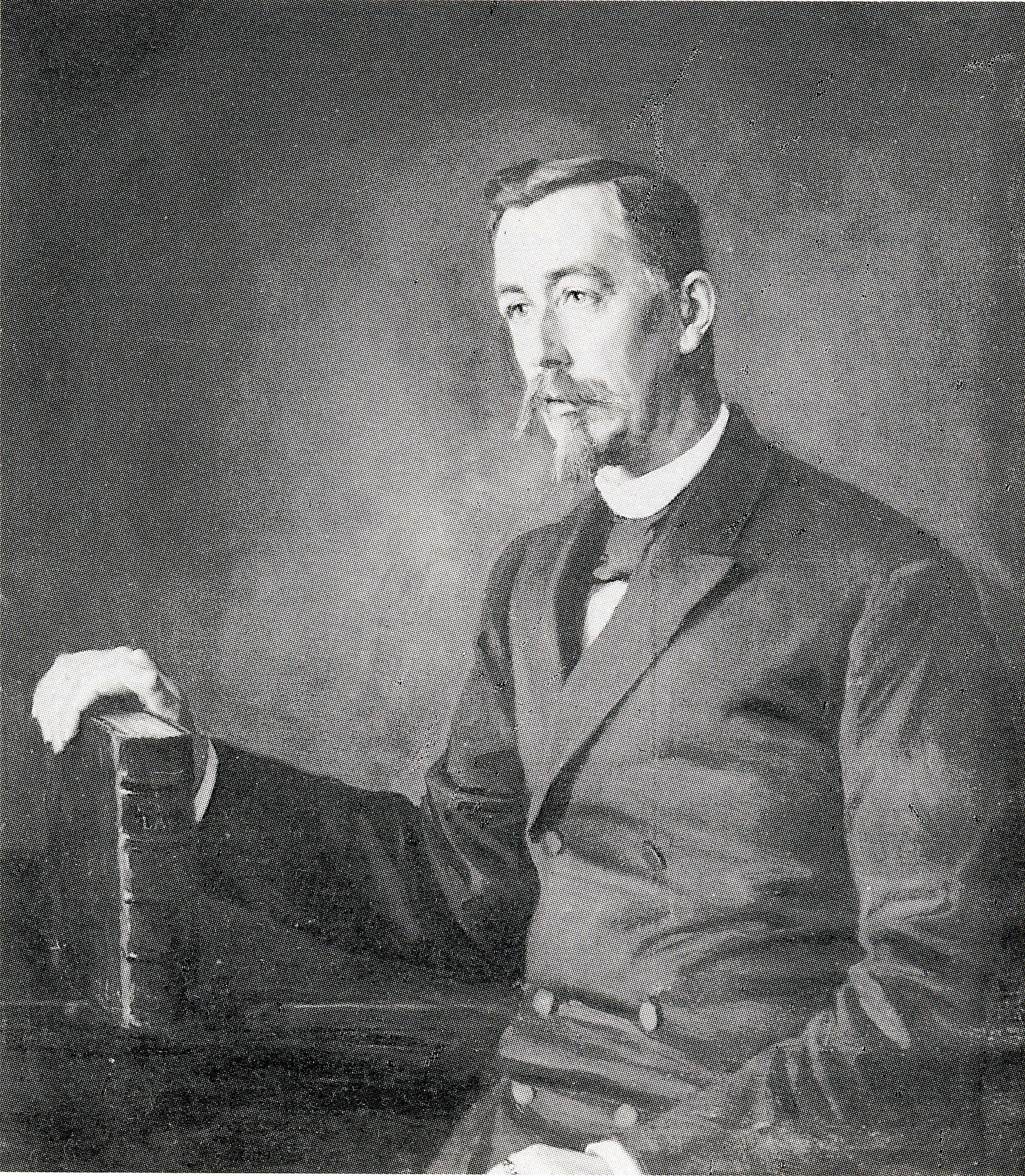 Professori R. A. Wreden muotokuva.